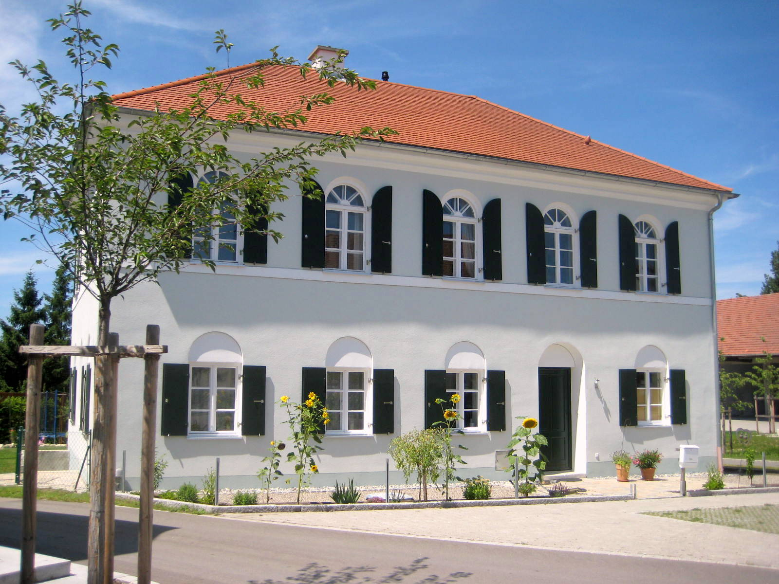 Geisenfeld liegt im Landkreis Pfattenhofen a.d. Ilm